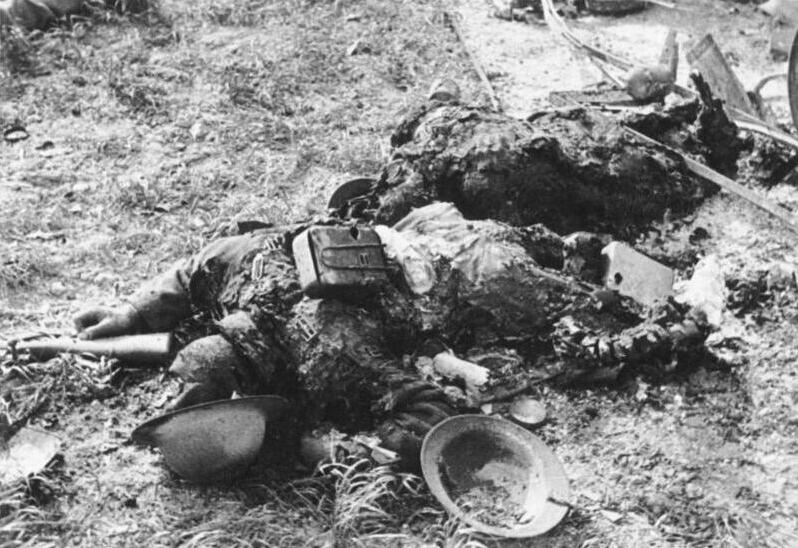 Verluste des Royal-Sussex-Regiments bei Amiens 21.5.1940, 9.00 Uhr